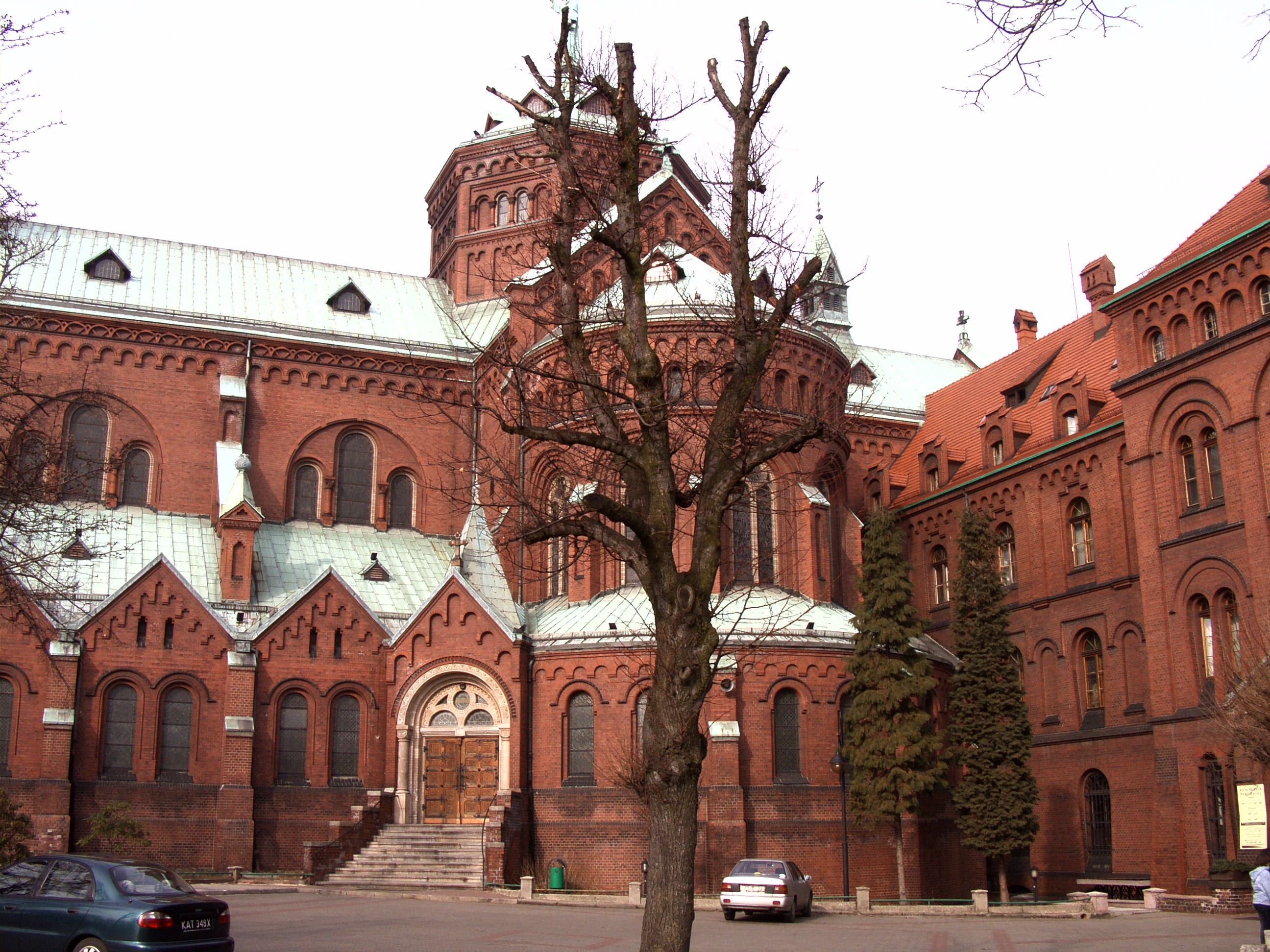 Bazylika oo. Franciszkanów w Panewnikach